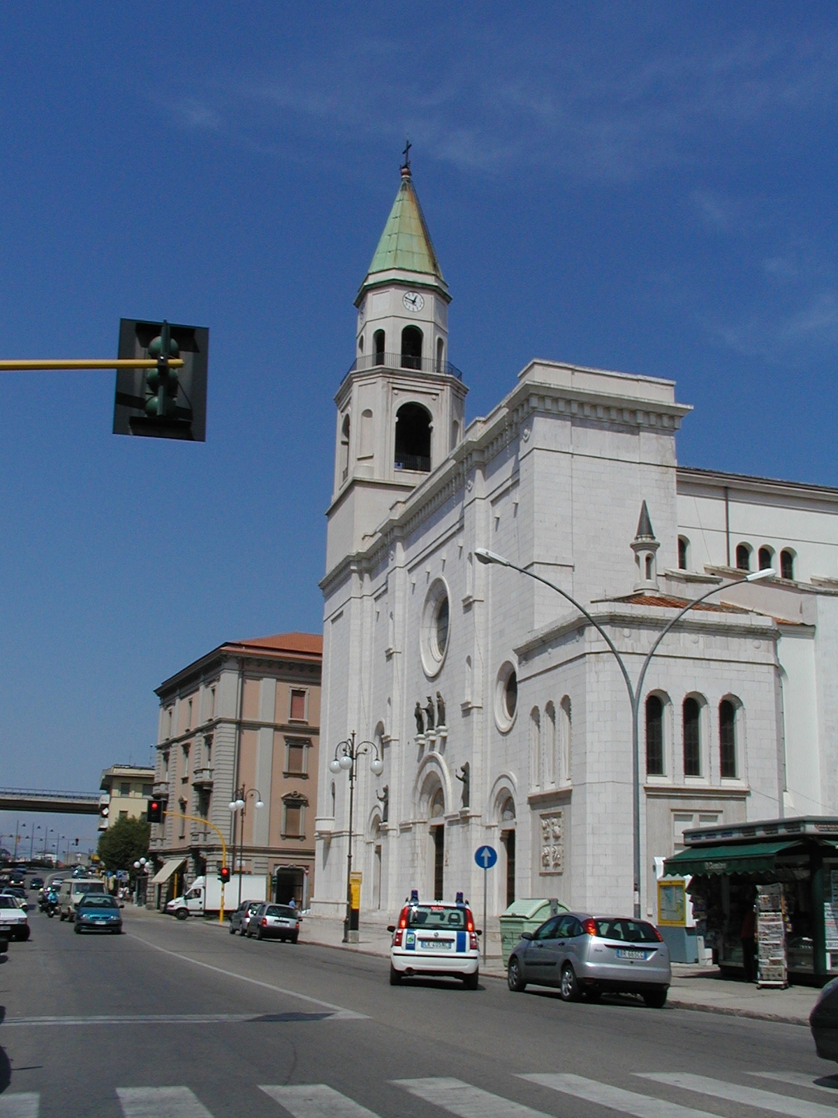 Chiesa S.Cetteo in Pescara